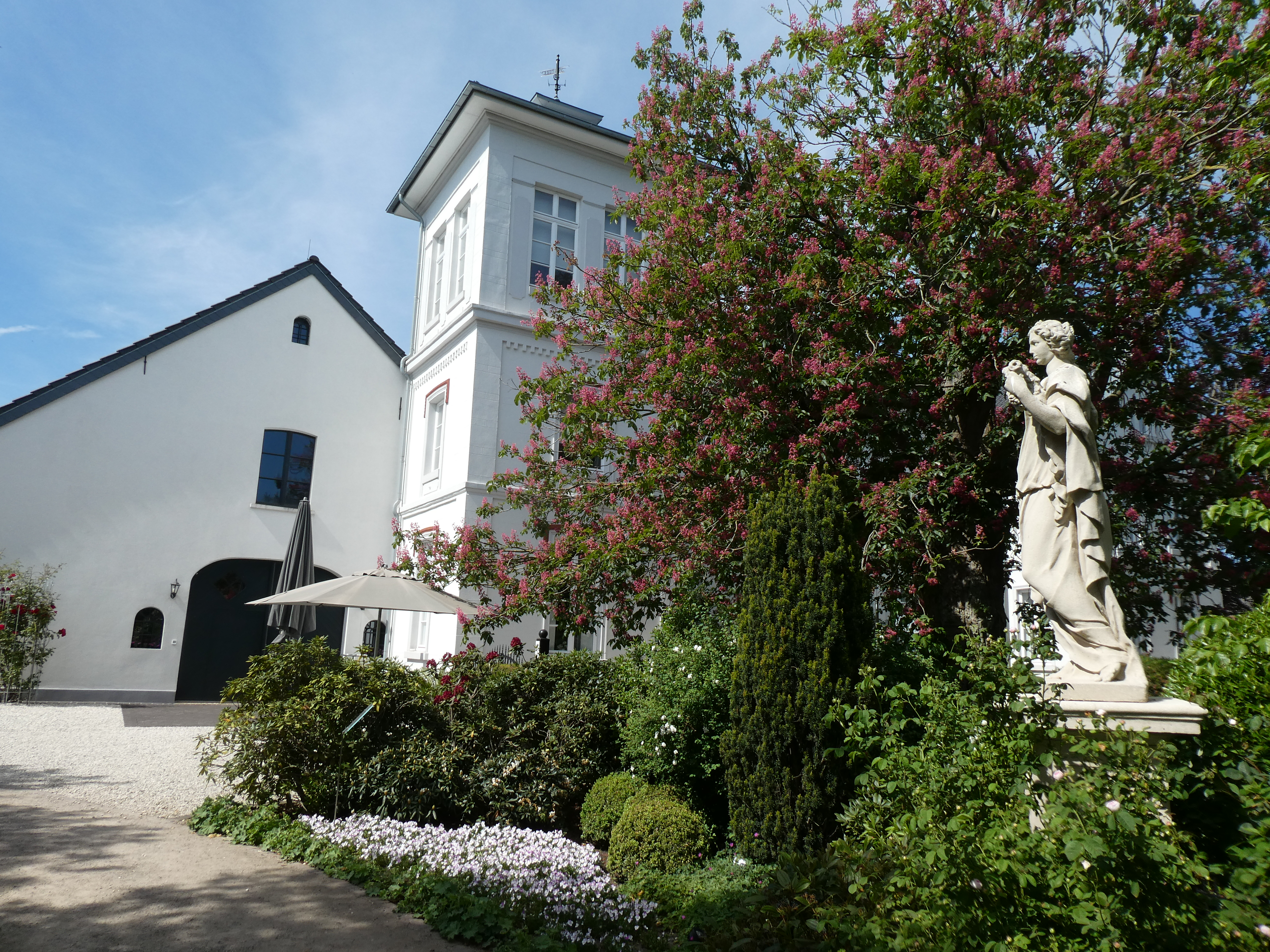 Gut Heidefeld in Spork, Wohnung des Ferdinand von Hamelberg